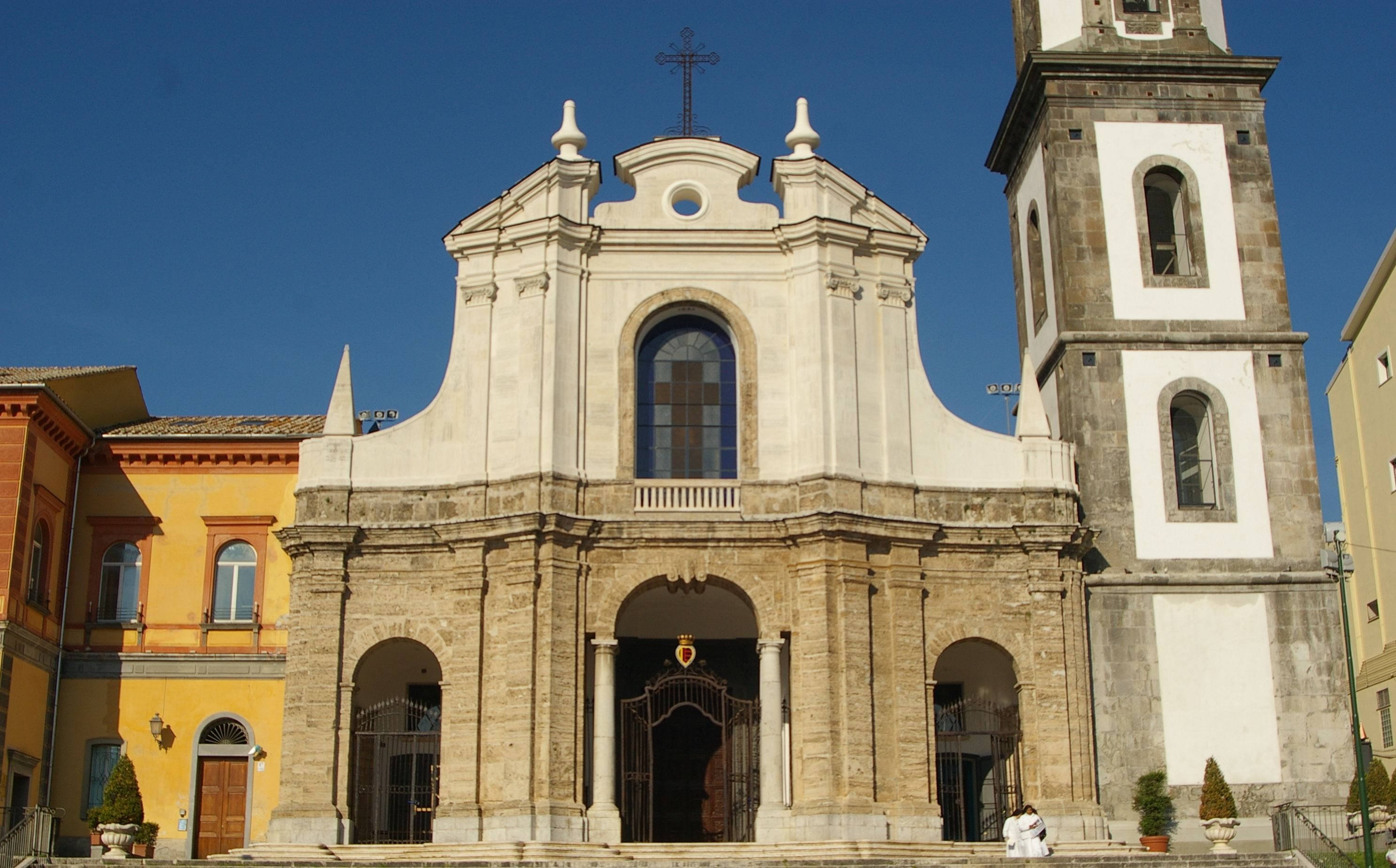 Eumolpa, opera propria, Facciata del Santuario di San Francesco e Sant' Antonio di Cava de' Tirreni, Campania, Italia